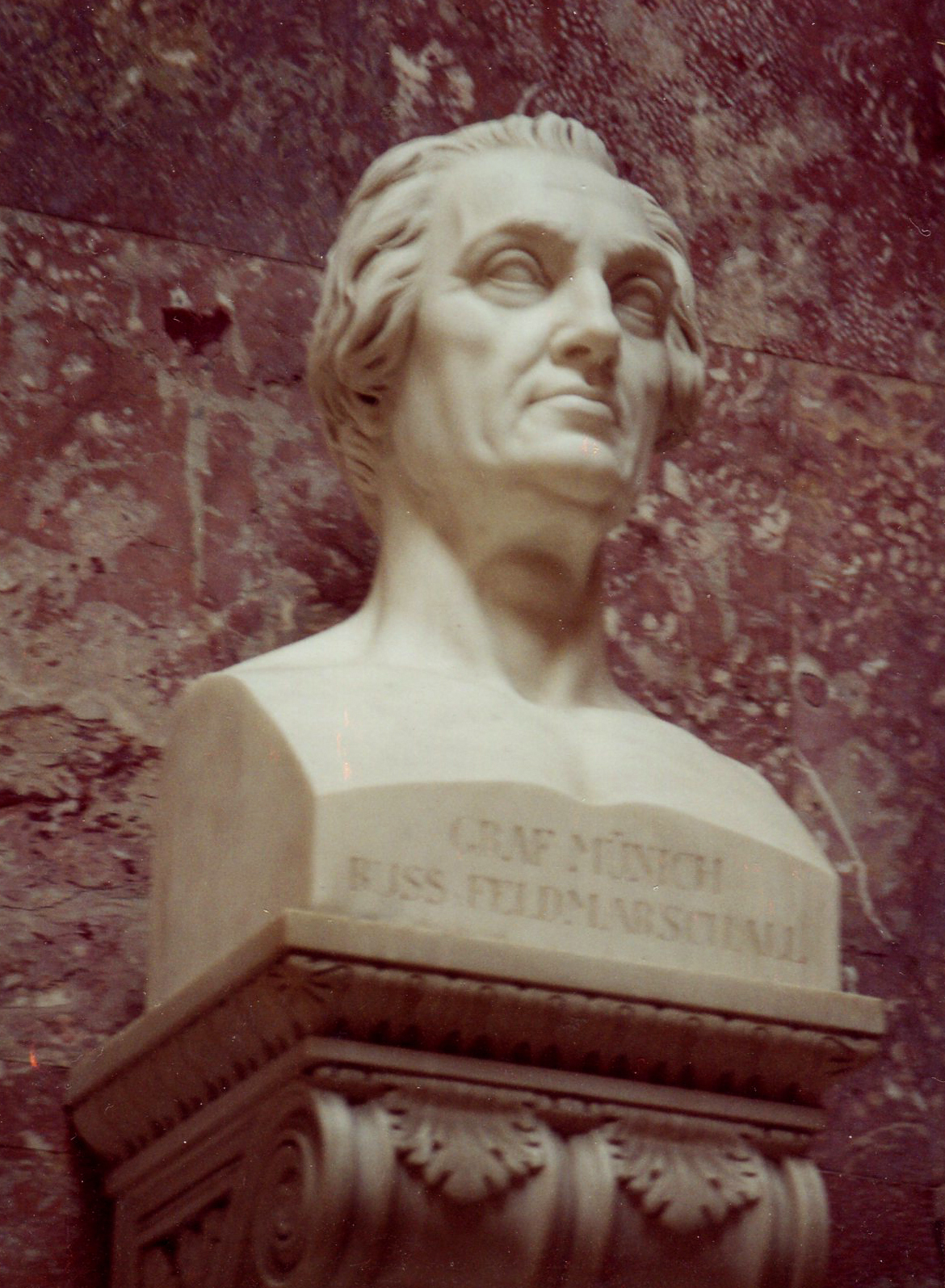 Памятник в "Зале славы" - "Валгалла"